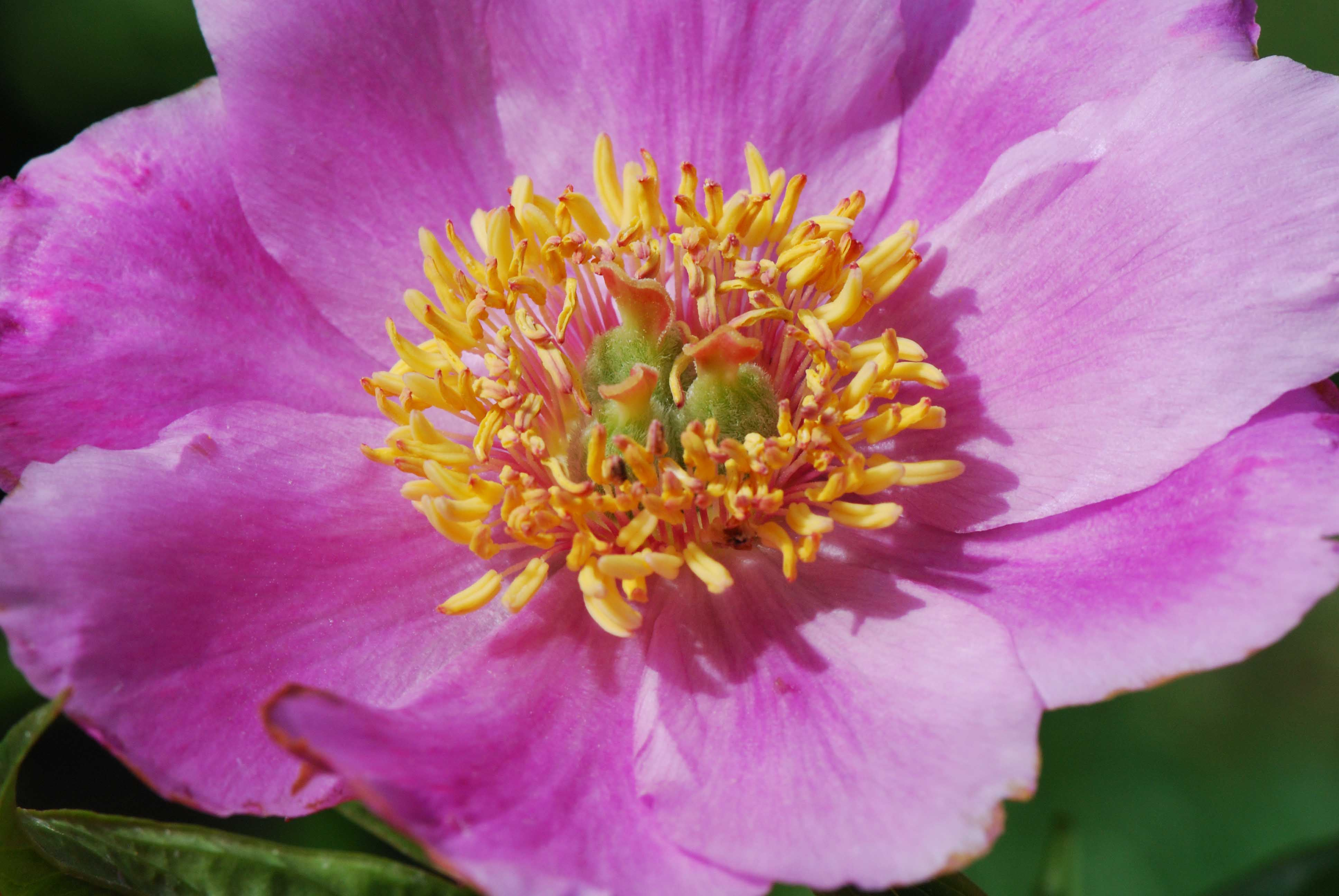 Paeonia anomala subsp. veitchii fleur, Jardin des Plantes de Paris